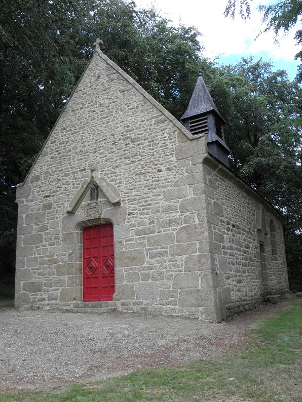 Vue méridionale de la chapelle Saint-Jacques de Marigny à Saint-Germain-en-Coglès (35).